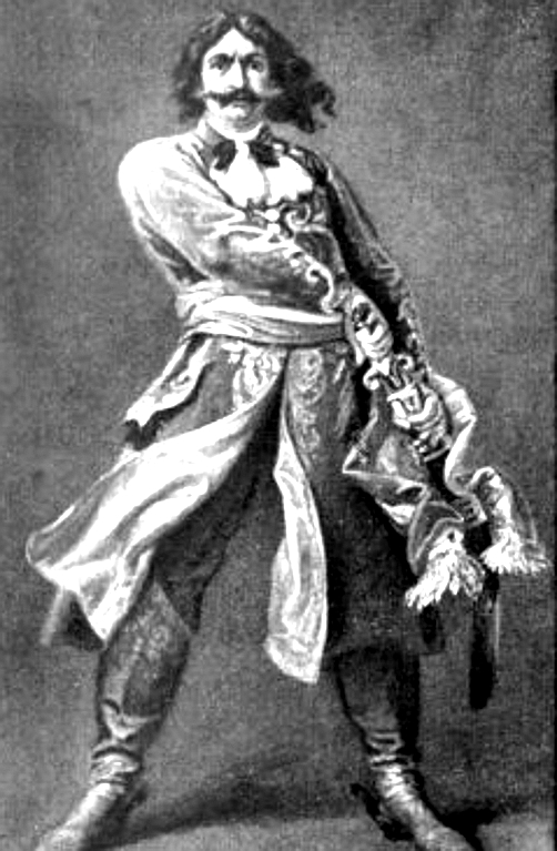 Nicolas Bercsenyi